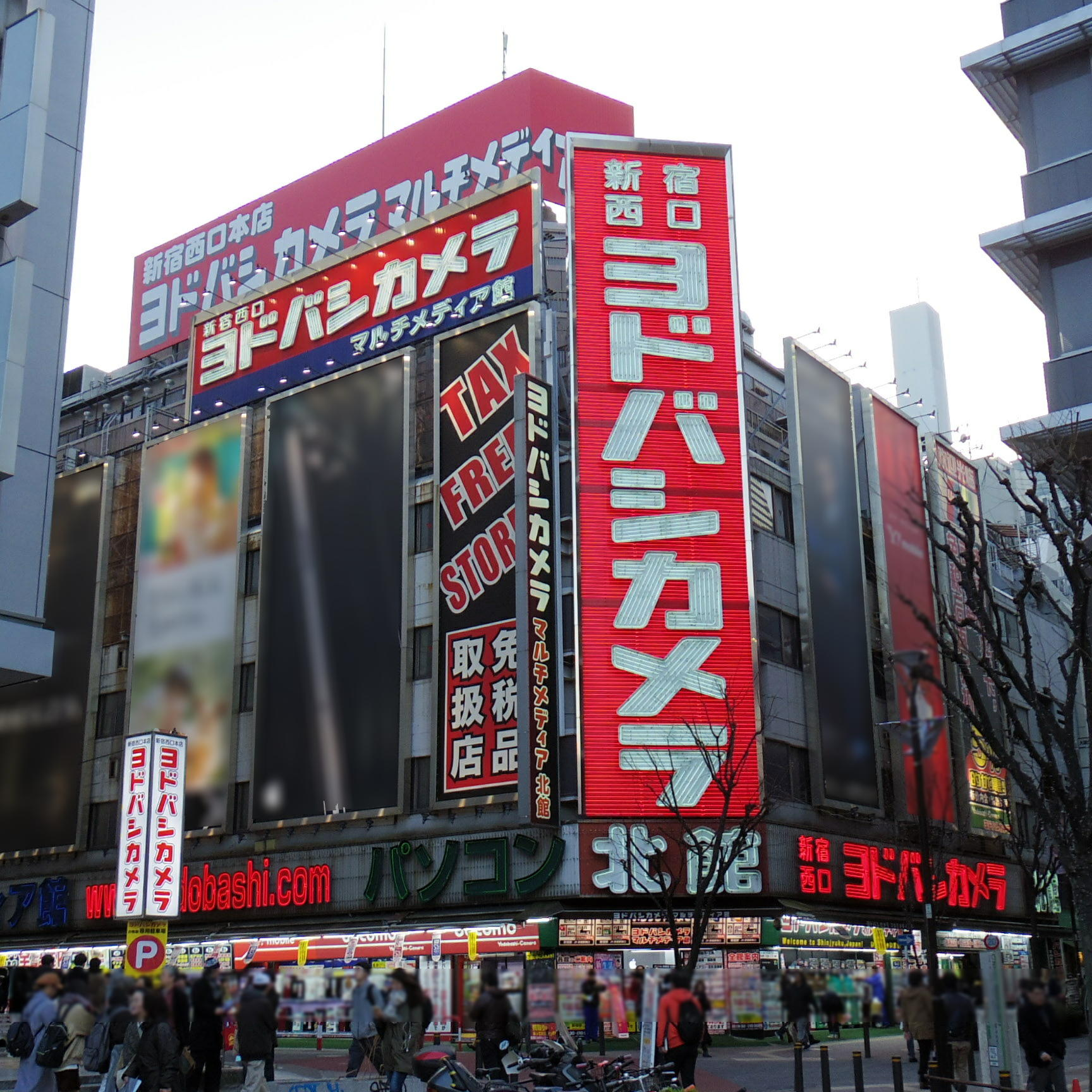 ヨドバシカメラ新宿西口マルチメディア館（事実上の本店）。2017年1月22日撮影。広告部分および店入口付近の人物部分をPaintgraphic3にてぼかし処理。